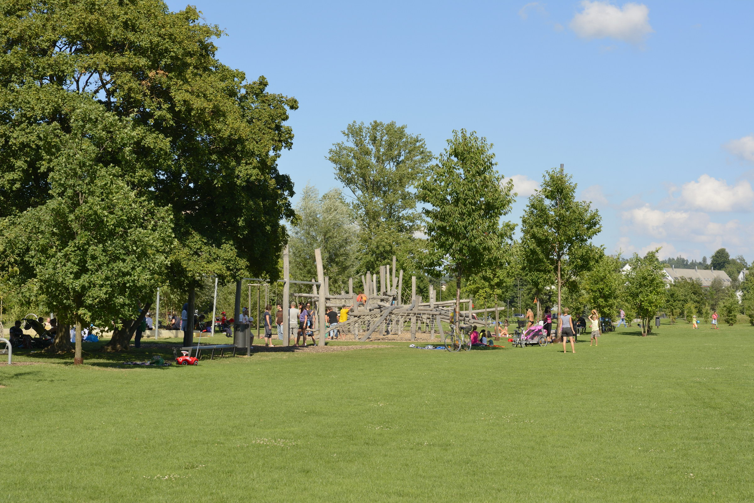 Spielplatz im Eulachpark Winterthur aus Entfernung